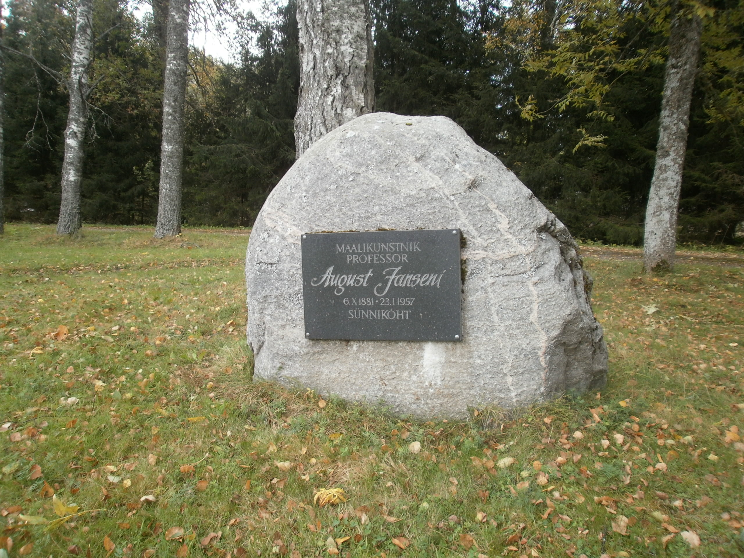 Mälestustahvel suvemõisa pargis maalikunstnik August Jansenile.